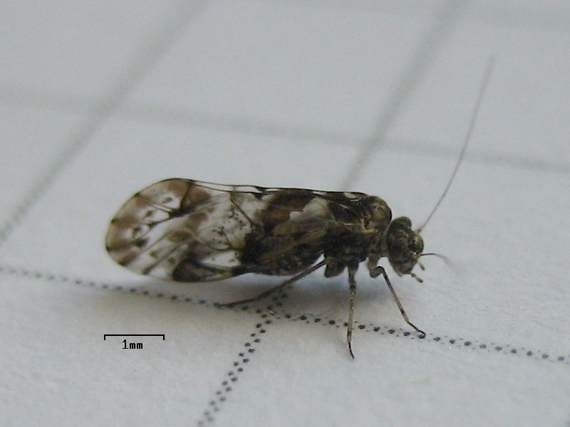 Staublaus (Trichadenotecnum sexpunctatum)